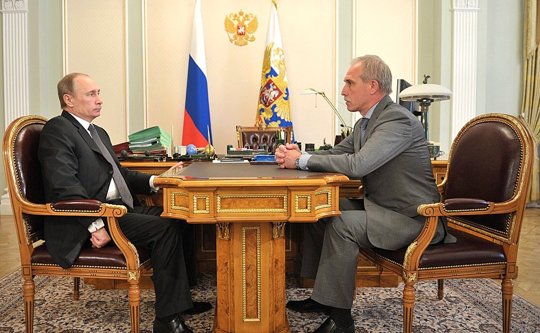 Рабочая встреча Президента России Владимира Путина с губернатором Ульяновской области Сергеем Морозовым